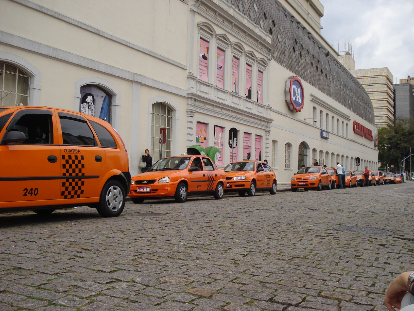 Taxis de Curitiba